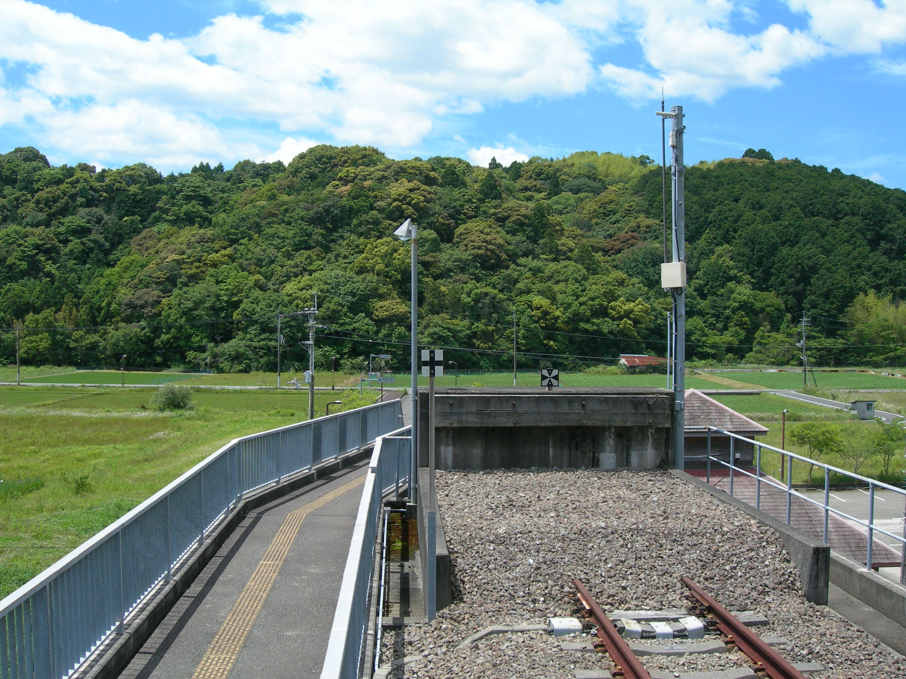 阿佐海岸鉄道・甲浦駅・線路の終端